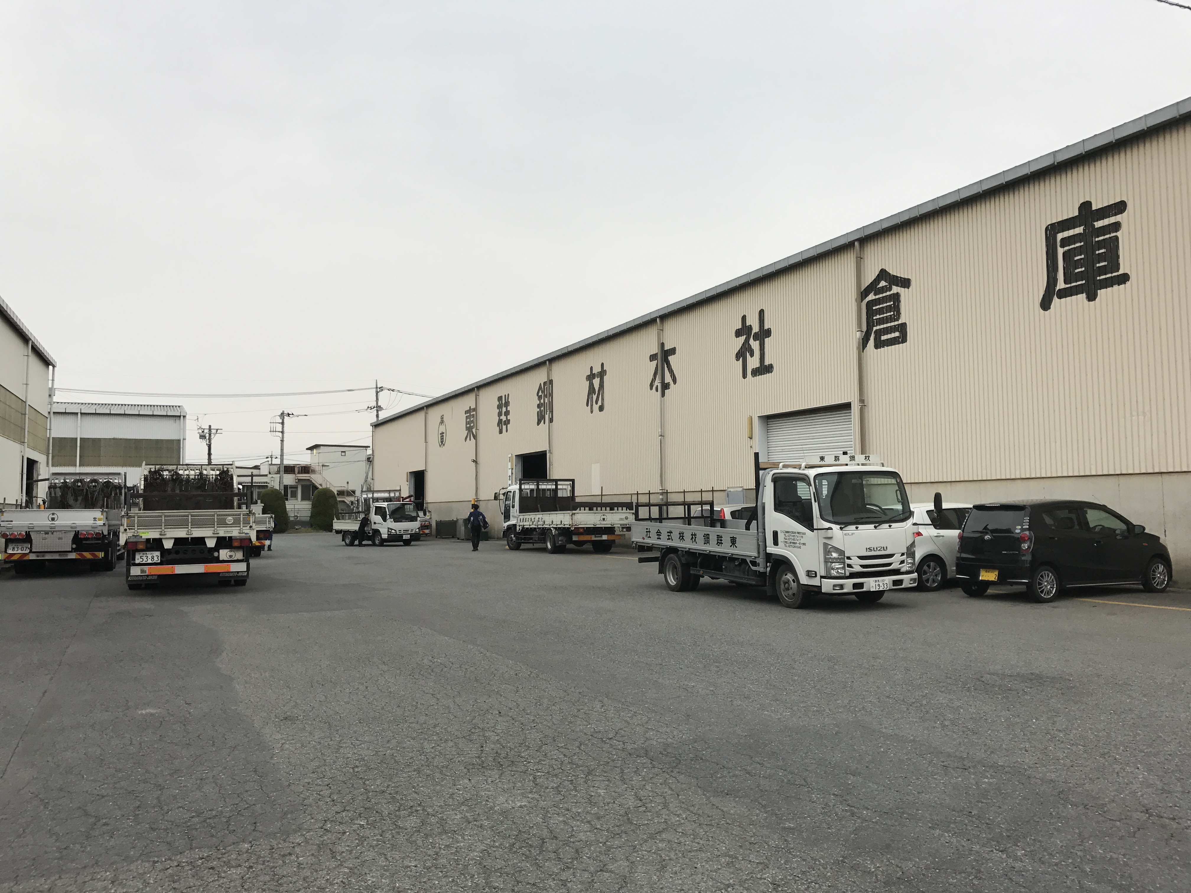 東群鋼材本社倉庫